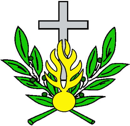 Logo de l'insigne de manche porté par les aumôniers de la gendarmerie nationale (France)